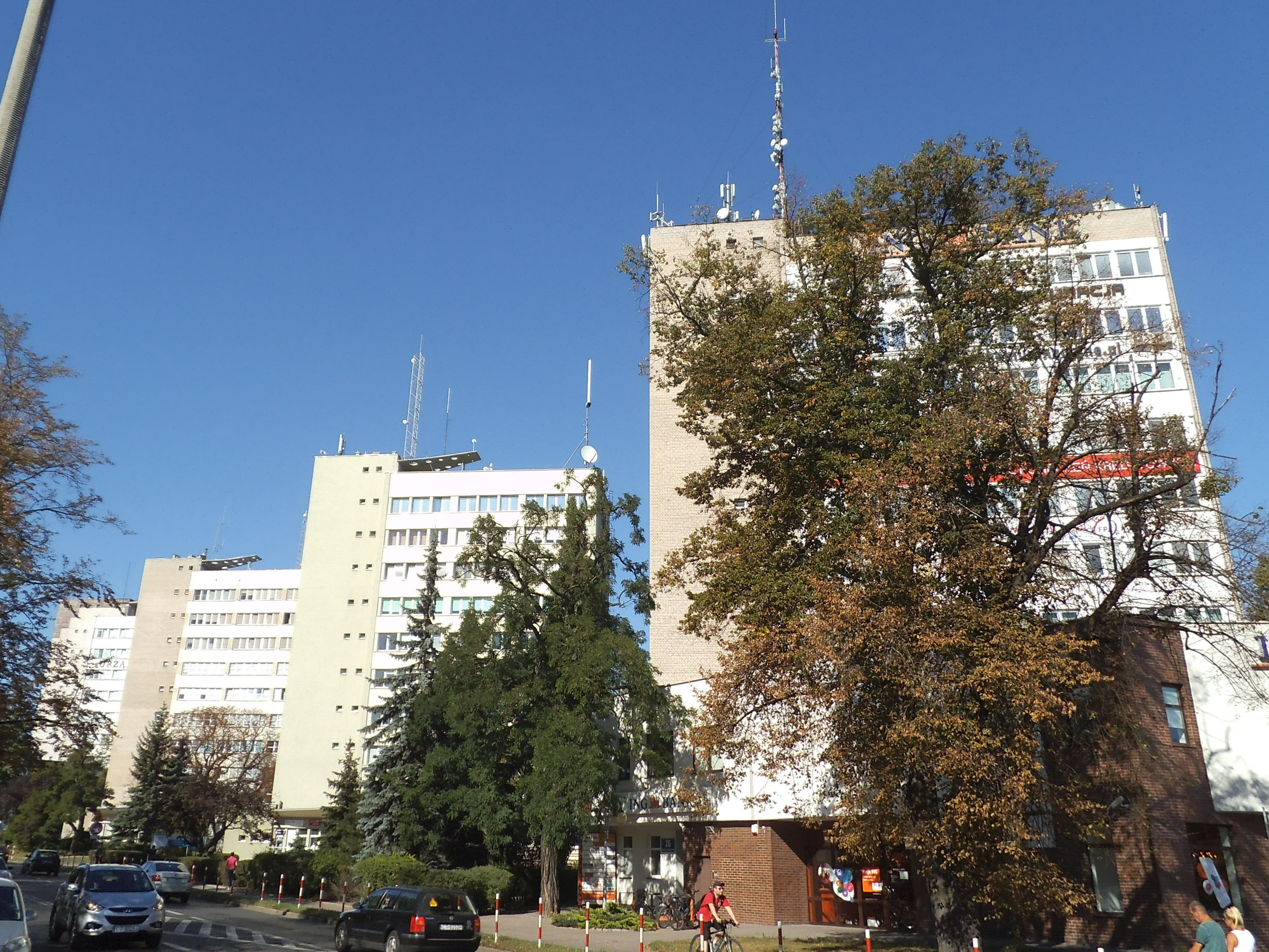 Cztery biurowce w południowej części Chełmińskiego Przedmieścia w Toruniu